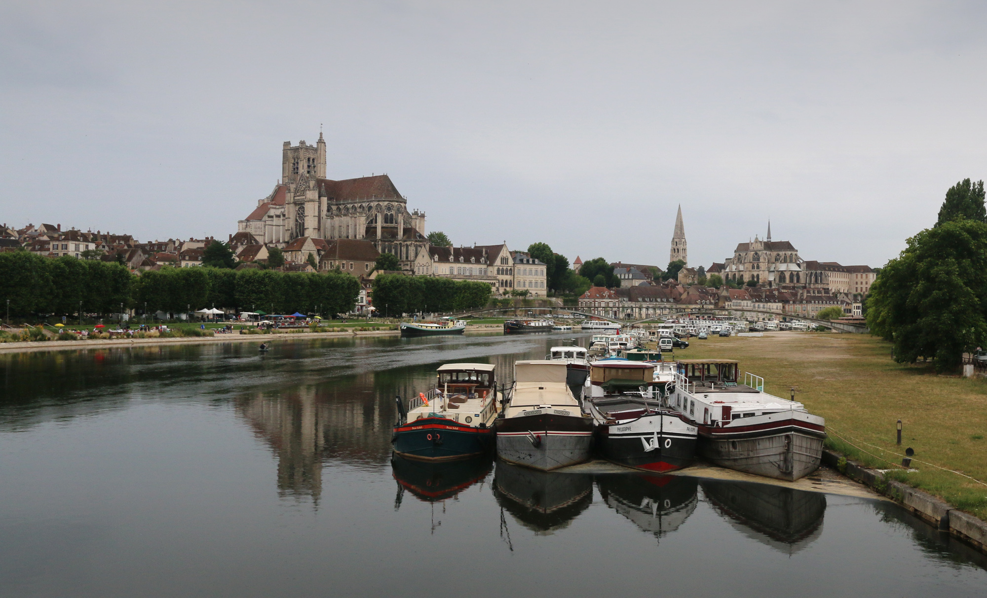 L'Yonne traverse la ville d'Auxerre